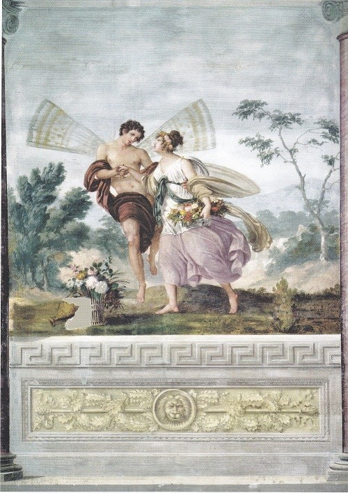 "Zefiro e Flora", tempera su parete, Palazzo Gobatti, Rovigo